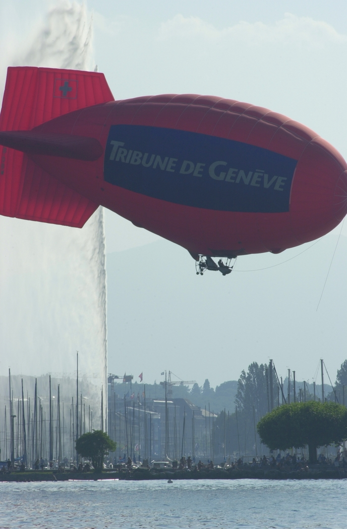 Durigeable du journal La Tribune de Genève